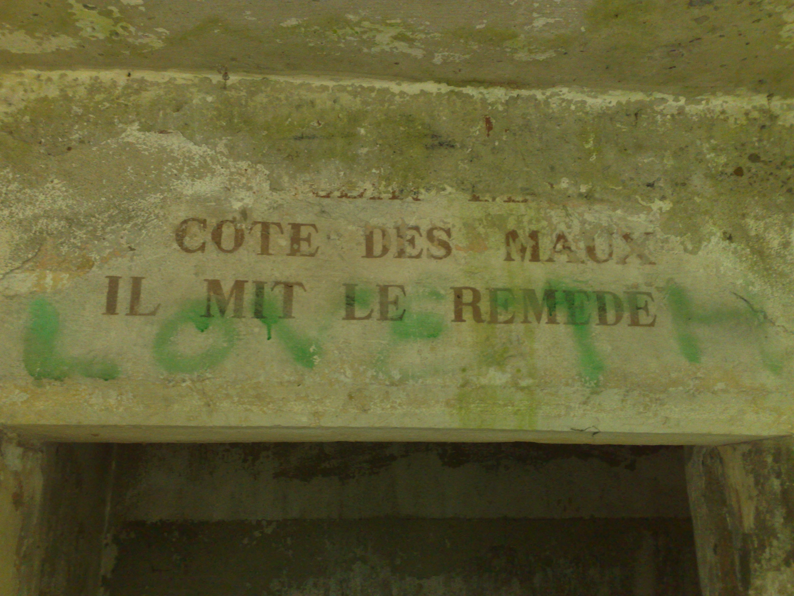 Inscription en français à l'entrée des anciens bains de la Caille en Haute-Savoie, France. L'inscription complète disait « BENI SOIT DIEU QUI FIT JAILLIR LES SOURCES. A CÔTE DES MAUX, IL MIT LE REMEDE ».